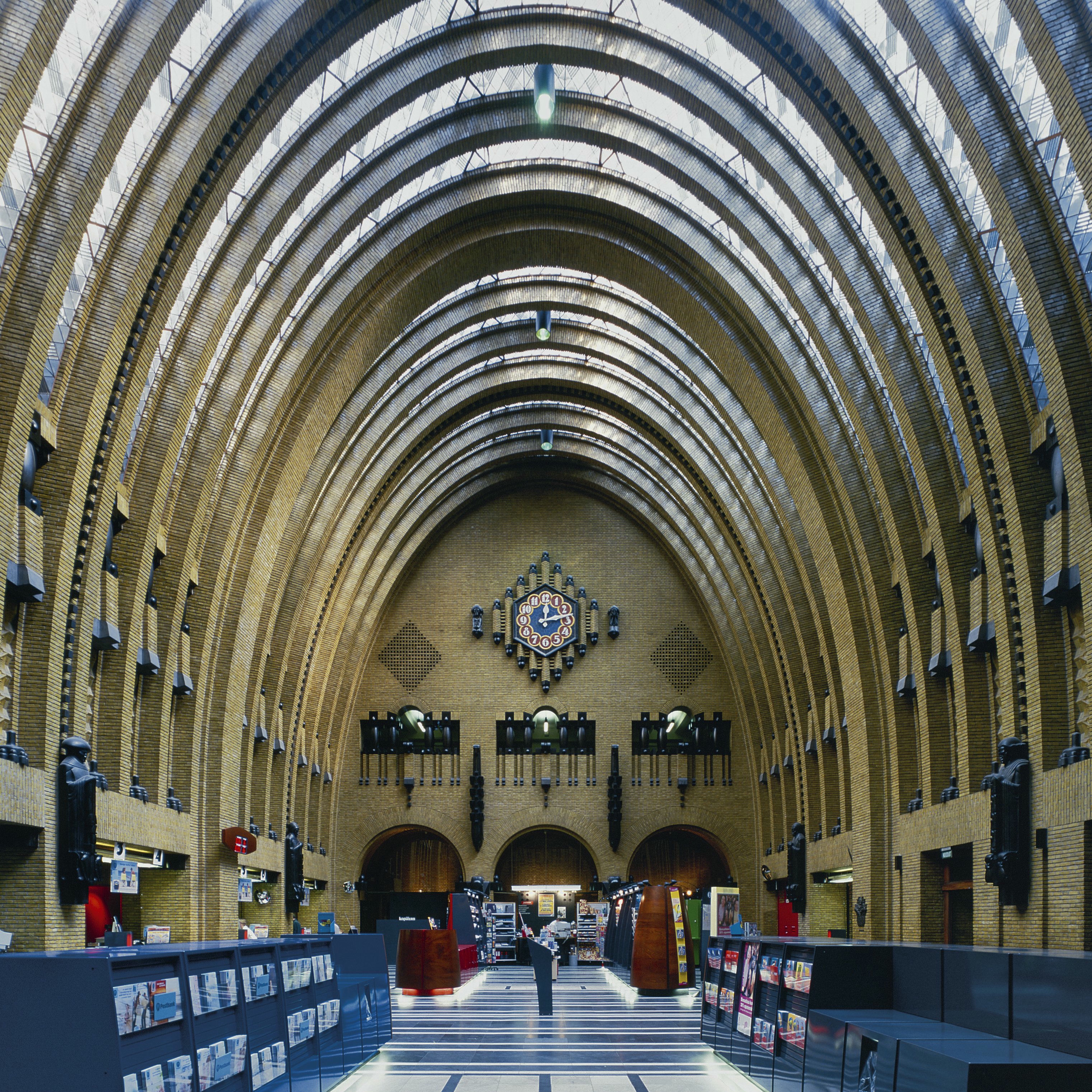 PTT- gebouw: Interieur van de centrale hal met decoraties (opmerking: Gefotografeerd voor ANWB Monumentenboek)